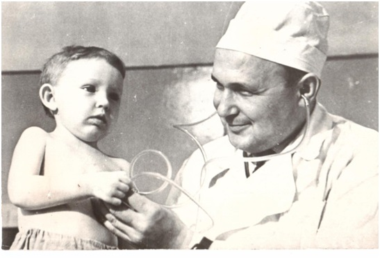 Фото 3.Ф.Х.Кутушев с прооперированной девочкой на 4-е сутки после операции на сердце, 1966г.